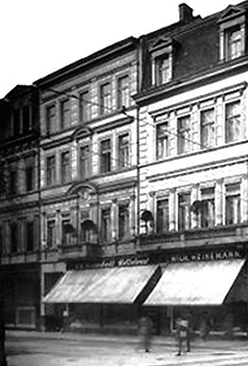 Haus Königsallee 13